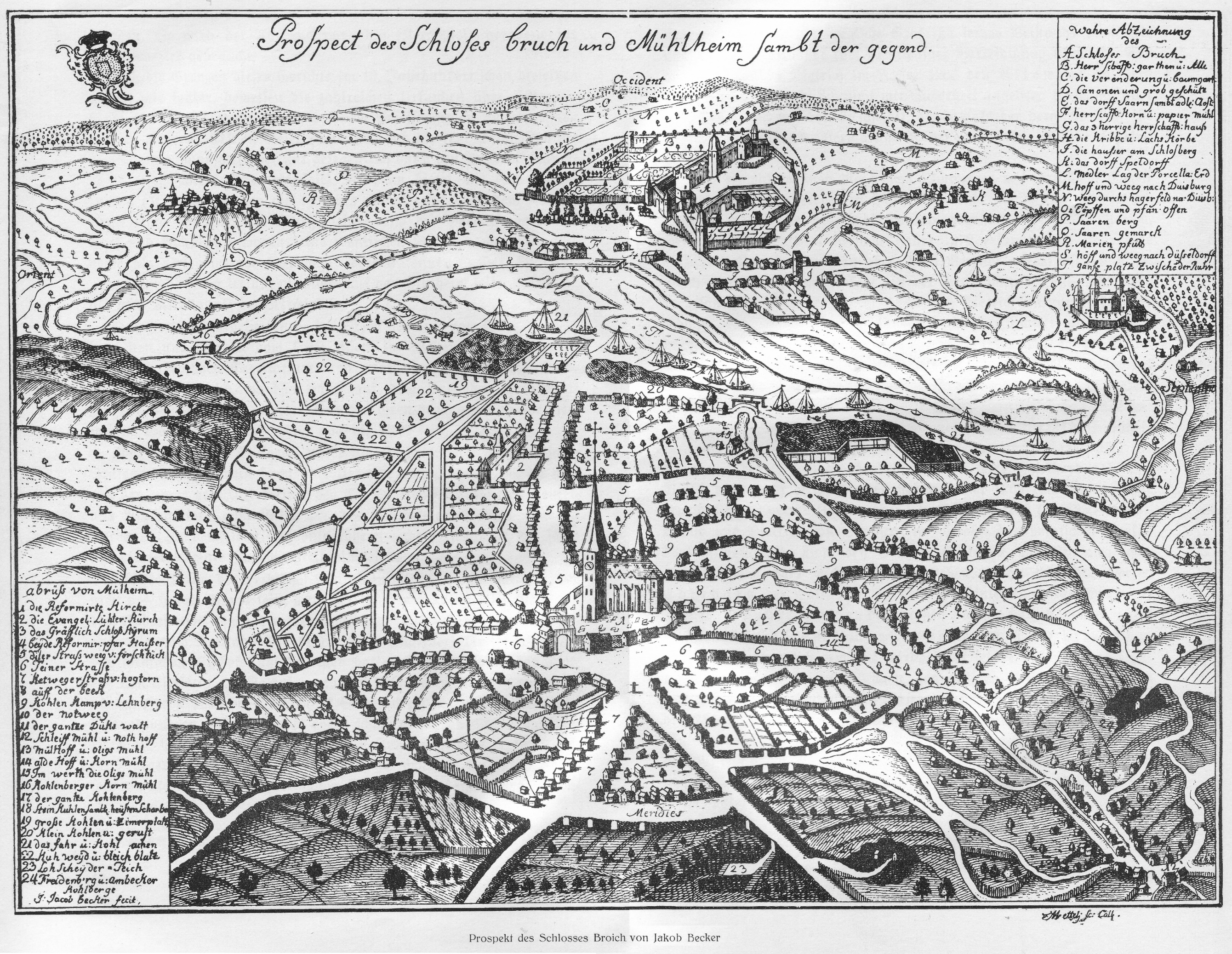 Prospect des Schloses Bruch und Mühlheim sambt der gegend